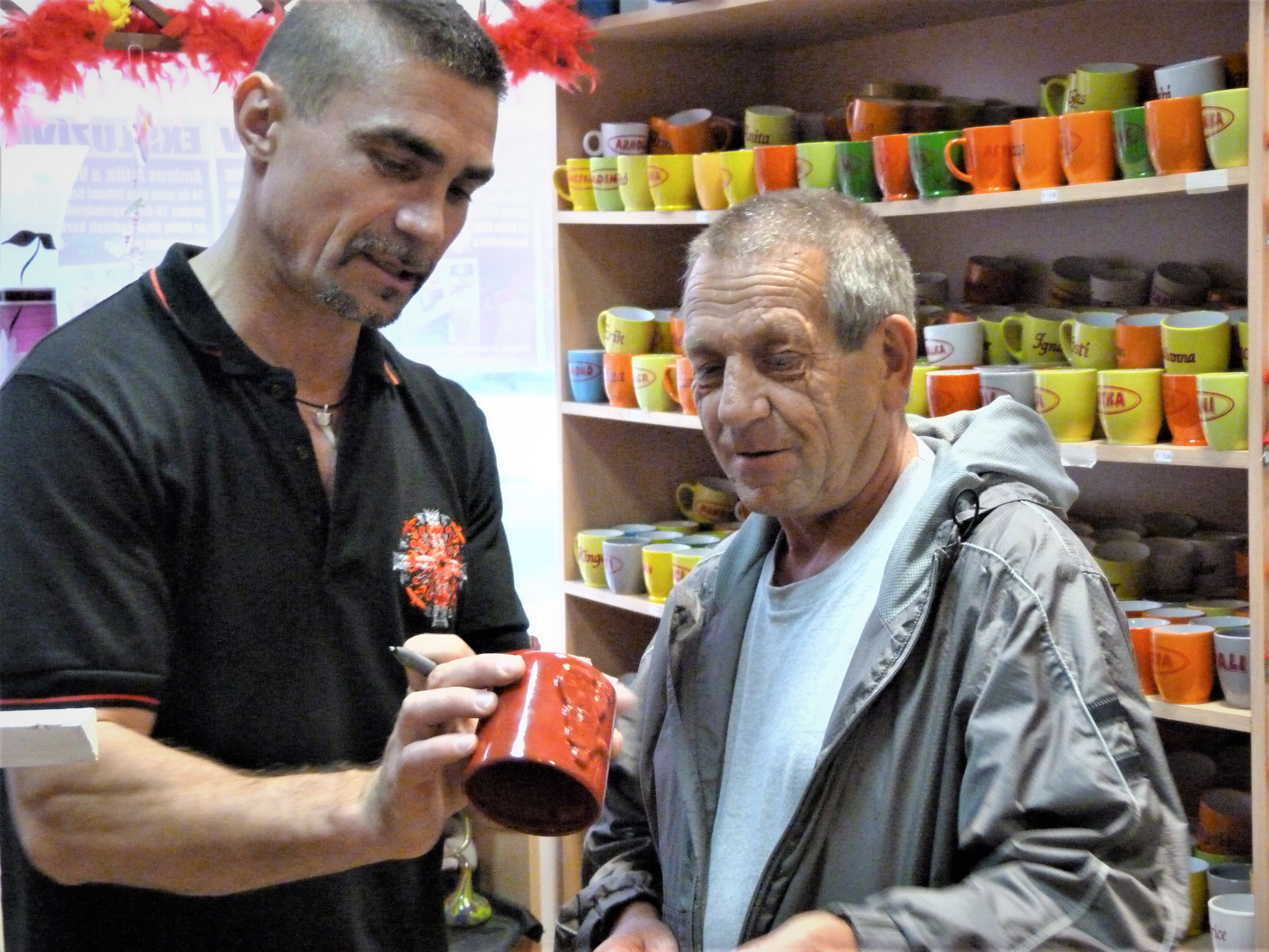 A felvétel 2013. Június 19 –én készült Csikszeredán, a Meglepi boltban. Ambrus Attila 14 év után hazatért Csikszeredába, szülővárosába. Források: Szökésben (hozzáférés 2013.07.02) P.Gál Judit - Ambrus Attila: Én a viszkis Julian Rubinstein: A viszkis rabló balladája ©© Derzsi Elekes Andor, Budapest, 2013, You are authorised to use this photo under Creative Commons – even for commercial, for profit purposes. The photo must be attributed to Derzsi Elekes Andor. All of the photos and vids in the Metapolisz DVD line are under Creative Commons and can be used even for commercial – for profit – purposes. Recommended Citation Derzsi Elekes Andor: Metapolisz DVD line Time: mashine time + 1 hour.